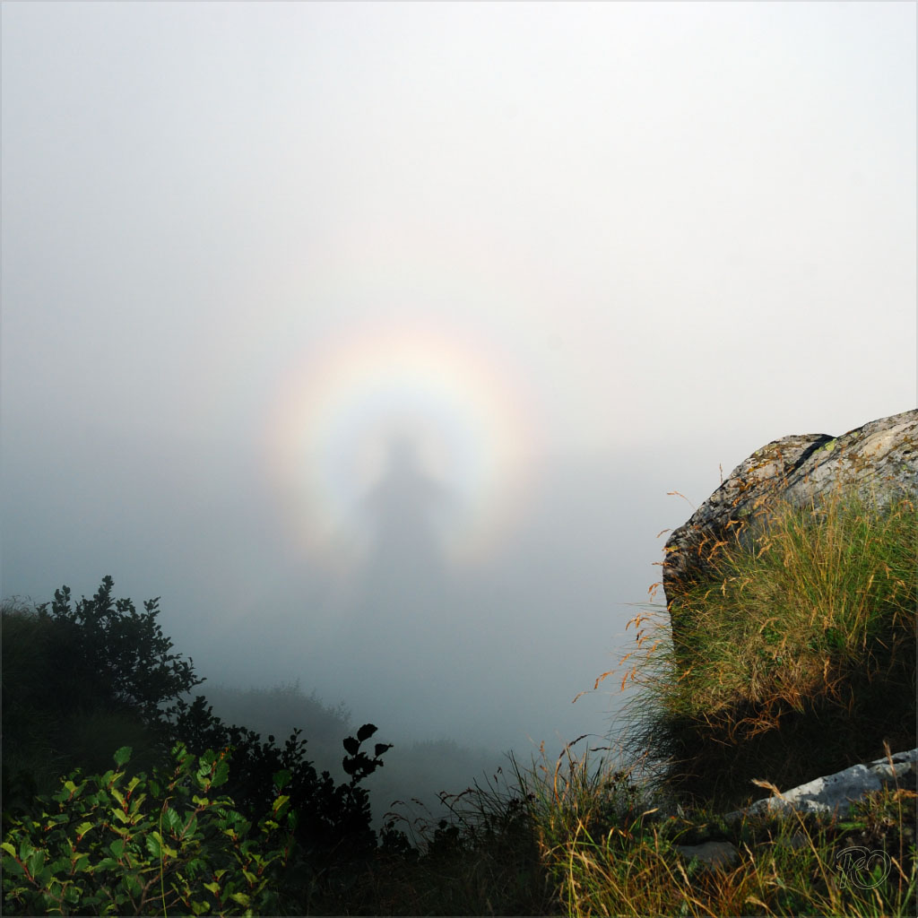 Карпатський біосферний заповідник, Рахівський, Тячівський, Хустський, Виноградівський райони